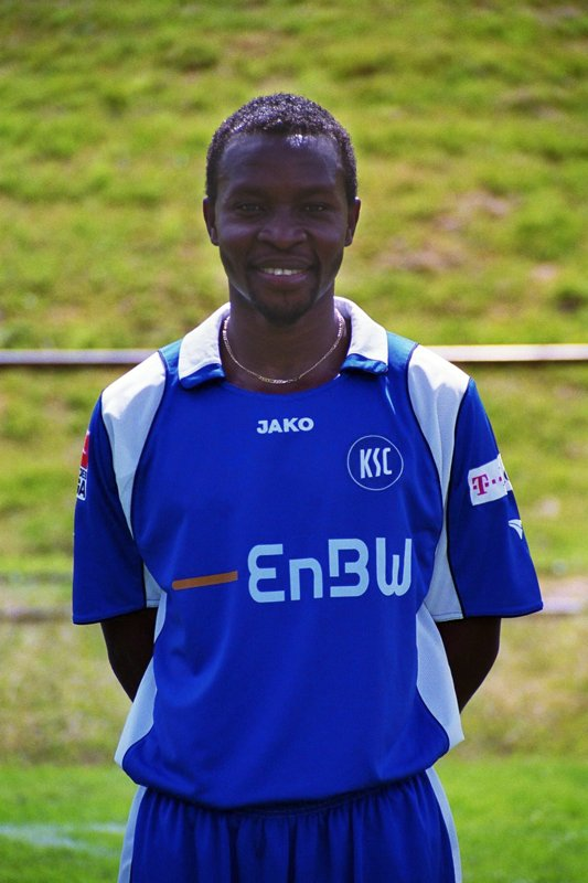 Godfried Aduobe